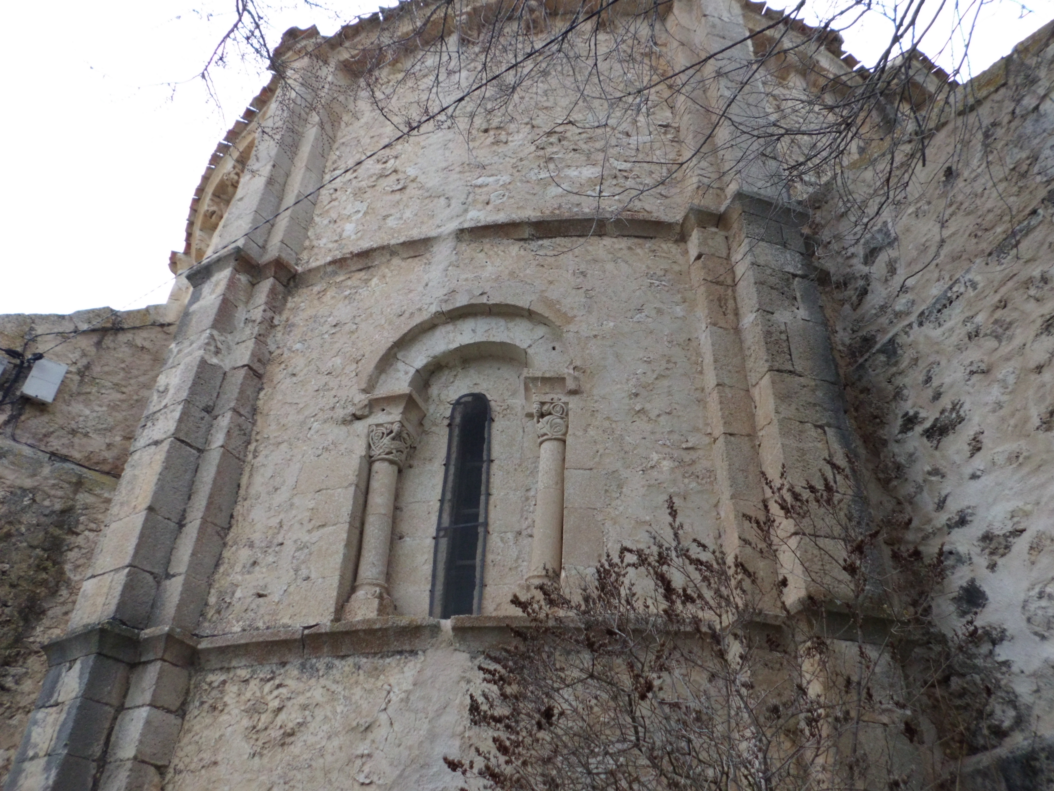 Iglesia de San Andrés en la localidad de Pecharromán (Segovia, España). Ventana románica del ábside.